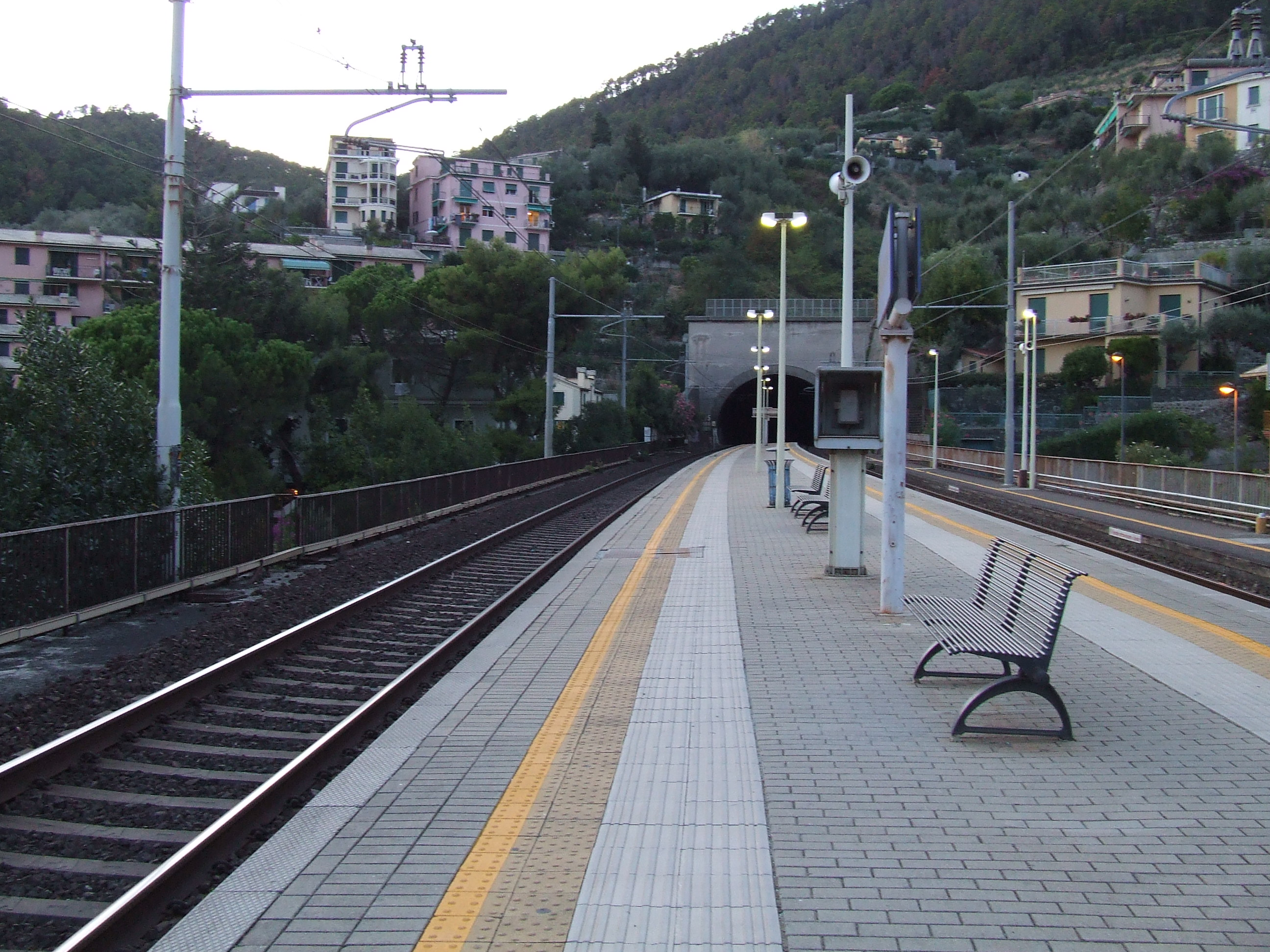 Vista del Binario 2 (direzione Genova) della stazione di Bonassola (SP)